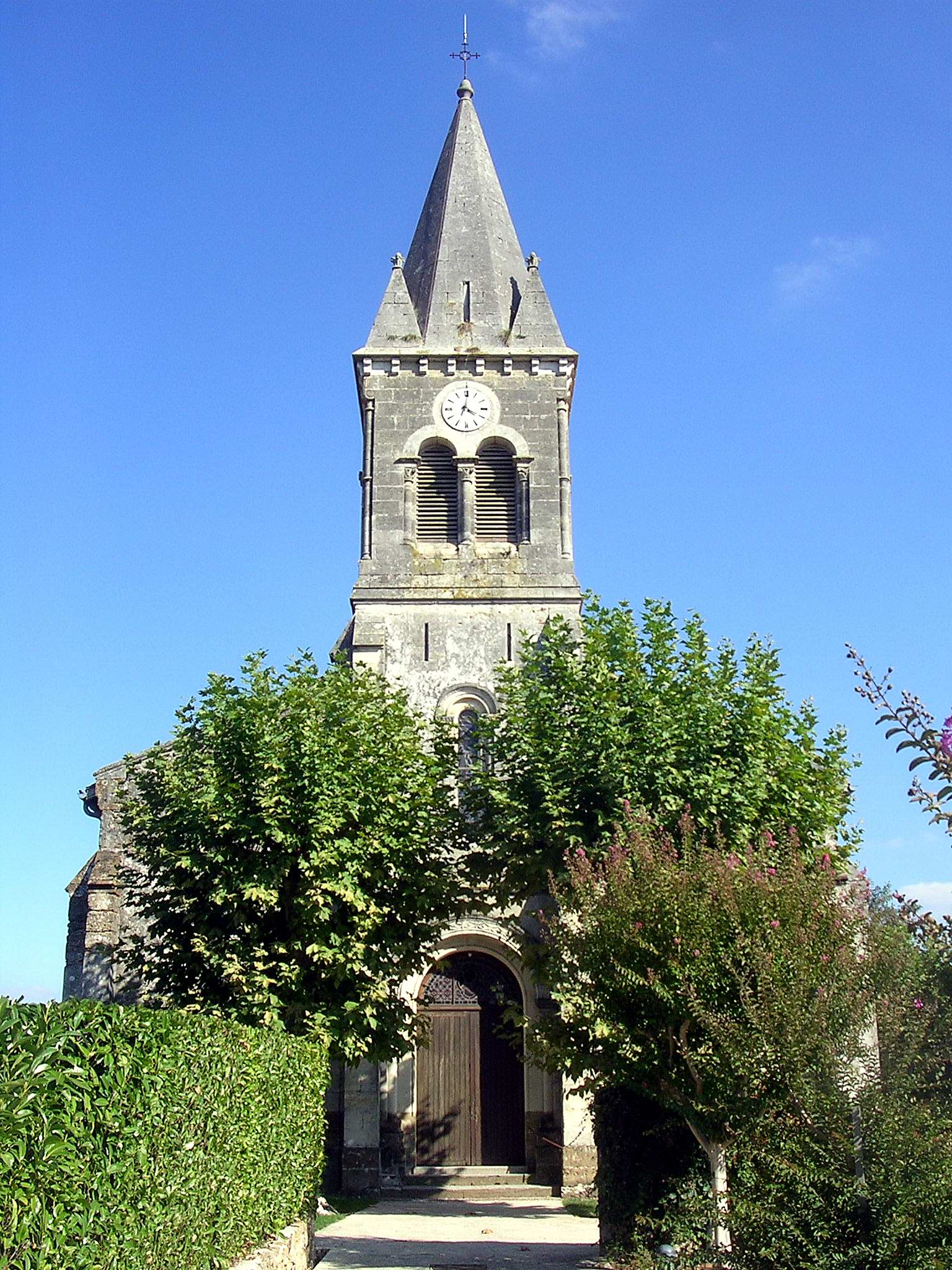 Eglise de Saint-Perdon, dans le département français des Landes